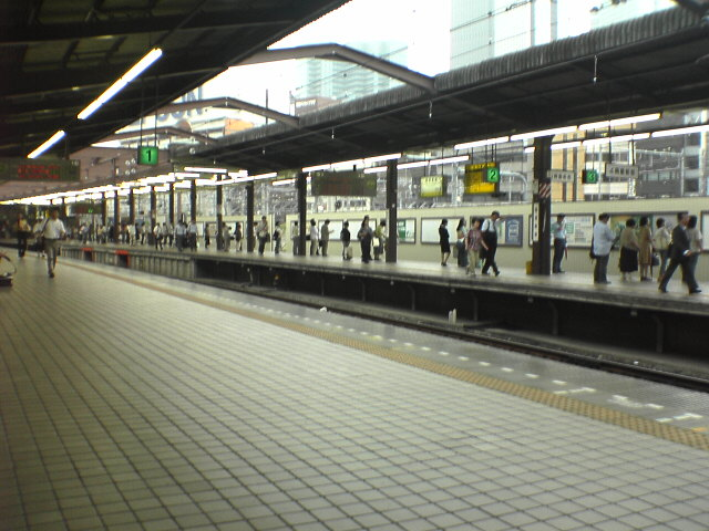 【撮影場所】 西武鉄道 西武新宿駅（西武新宿線）本川越方面ホーム上 【撮影者】 投稿者に同じ 【撮影時期】 2005年6月 Category:鉄道駅ホーム画像